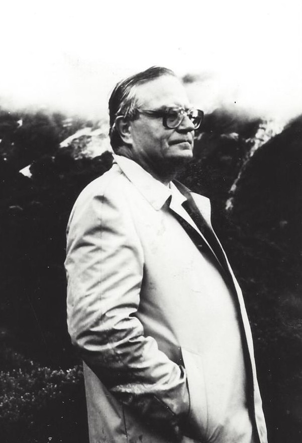 Seitliche Fotografie von Helmut Motekat